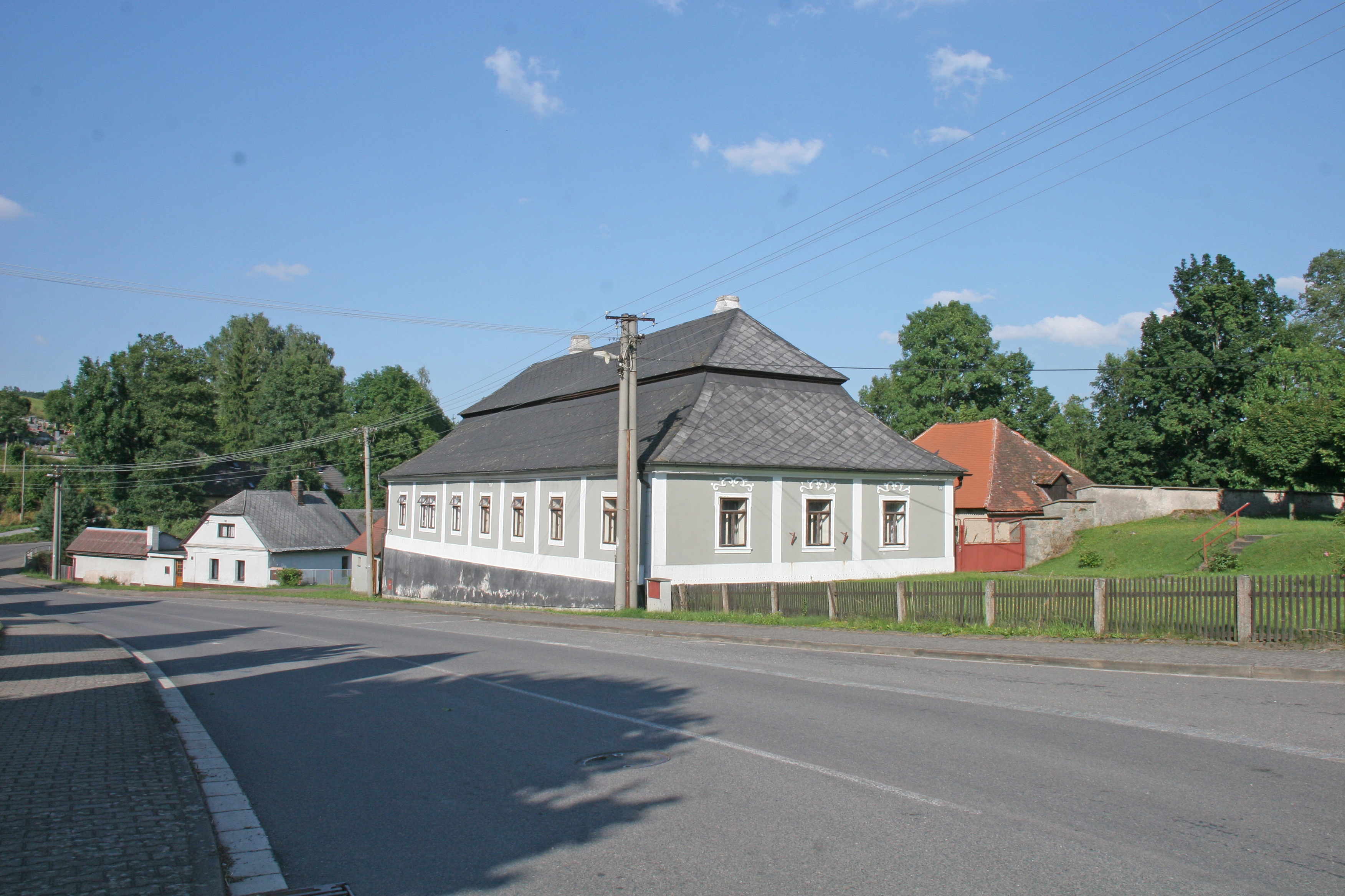 Fara (Bojanov), nám. 36, Bojanov, Bojanov.